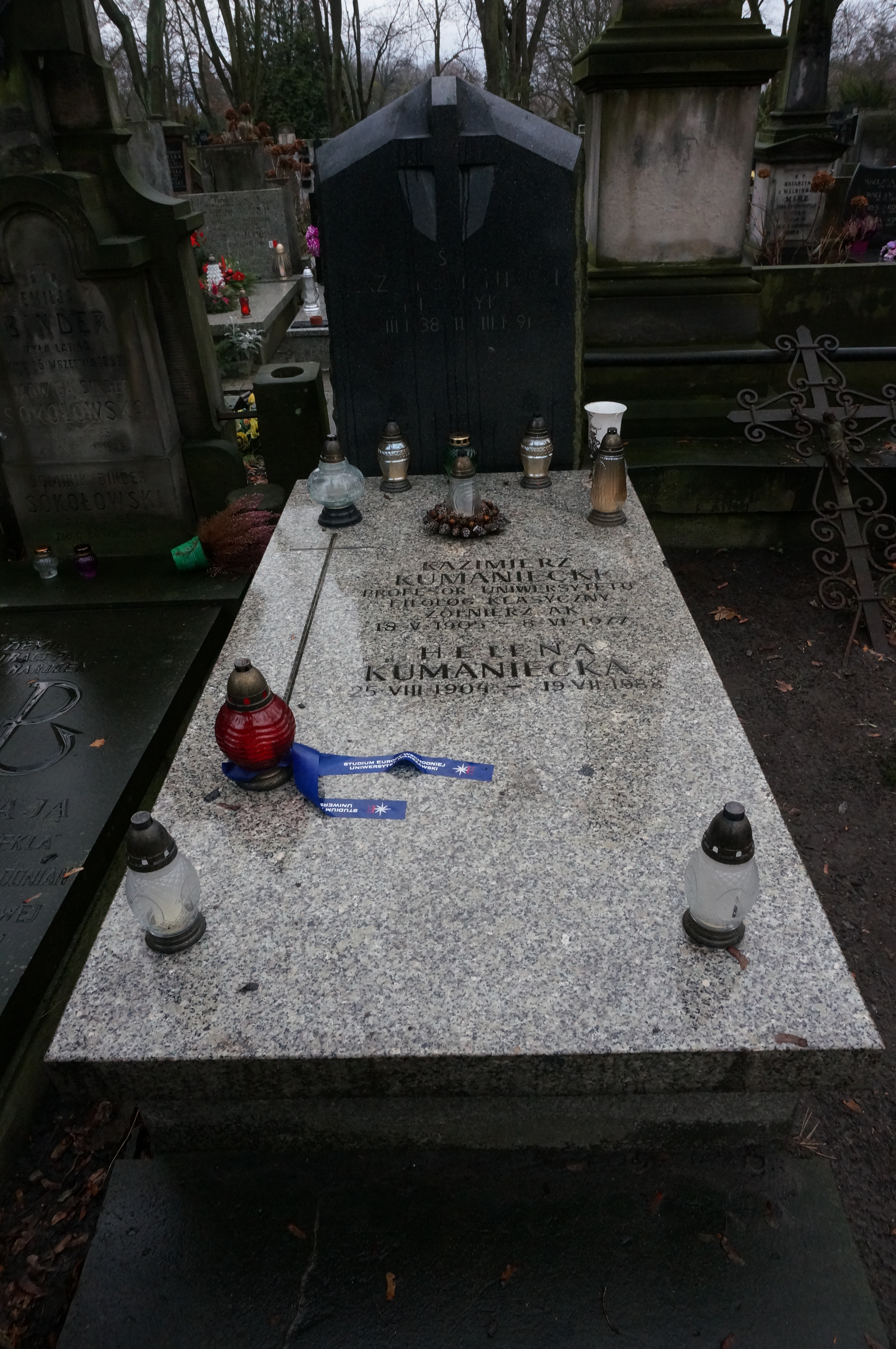 Grób Janiny Kumanieckiej na Cmentarzu Powązkowskim (kwatera 77, rząd 1, grób 9)